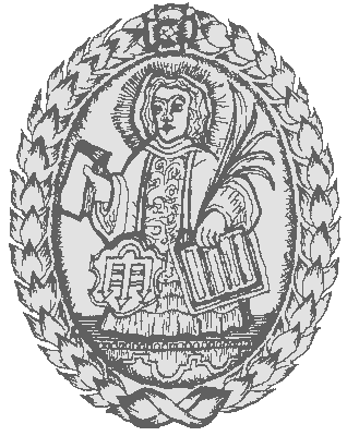 Logo des Gymnasium Laurentianum Warendorf. Stammt von einer Lederprägung eines Prämienbuches aus dem 18. Jahrhundert